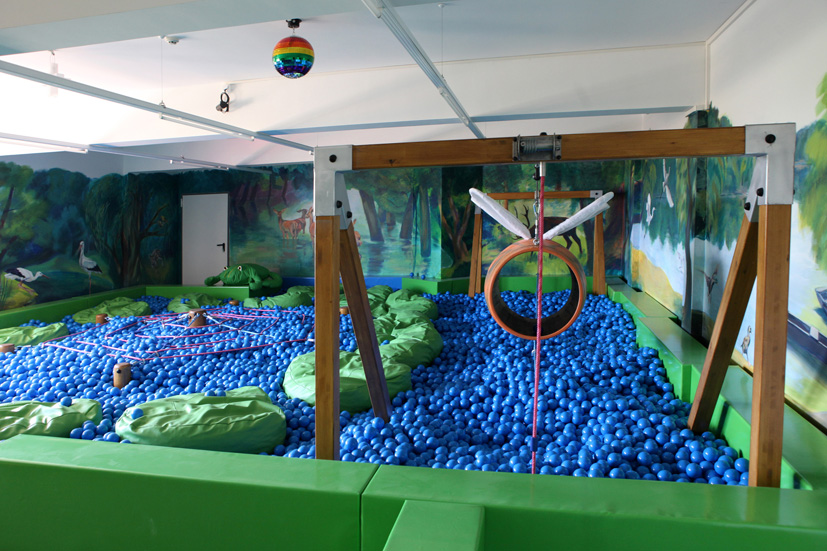 játszó szoba 12 év alatti gyerekeknek